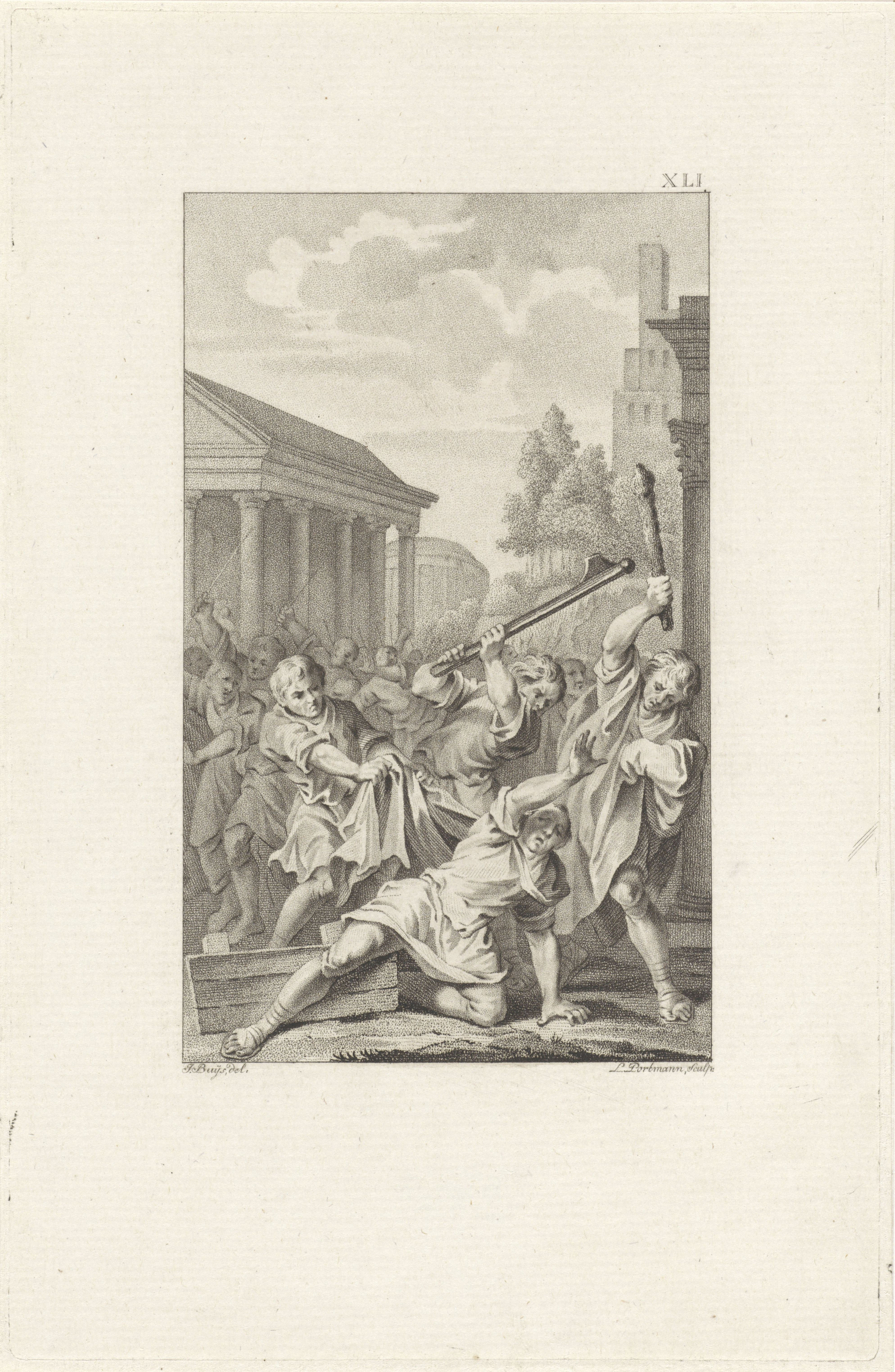 IdentificatieTitel(s): Moord op Tiberius GracchusObjecttype: prent boekillustratie Objectnummer: RP-P-1905-2184Opschriften / Merken: verzamelaarsmerk, verso onder, gestempeld: Lugt 2228Omschrijving: Tijdens een bijeenkomst op het Capitool wordt Tiberius Sempronius Gracchus III, op bevel van zijn neef Scipio Nasica, door mannen met stokken doodgeslagen.VervaardigingVervaardiger: prentmaker: Ludwig Gottlieb Portman (vermeld op object)naar tekening van: Jacobus Buys (vermeld op object)Plaats vervaardiging: AmsterdamDatering: 1797Fysieke kenmerken: stippelets en etsMateriaal: papier Techniek: stippelets / etsenAfmetingen: plaatrand: h 206 mm × b 133 mmToelichtingIllustratie uit: Stuart, Martinus. Romeinsche geschiedenissen, deel XI, p. 266. Amsterdam: Johannes Allart, 1797.OnderwerpWat: male persons from classical history (GRACCHUS TIB. S.) - suffering, misfortune of person from classical historyVerwerving en rechtenVerwerving: aankoop 1905Copyright: Publiek domein